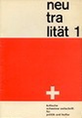 Titelseite der Zeitschrift "Neutralität"